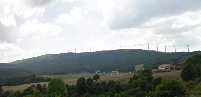 Monte Castelfraiano visto dalla piana di Lupara.